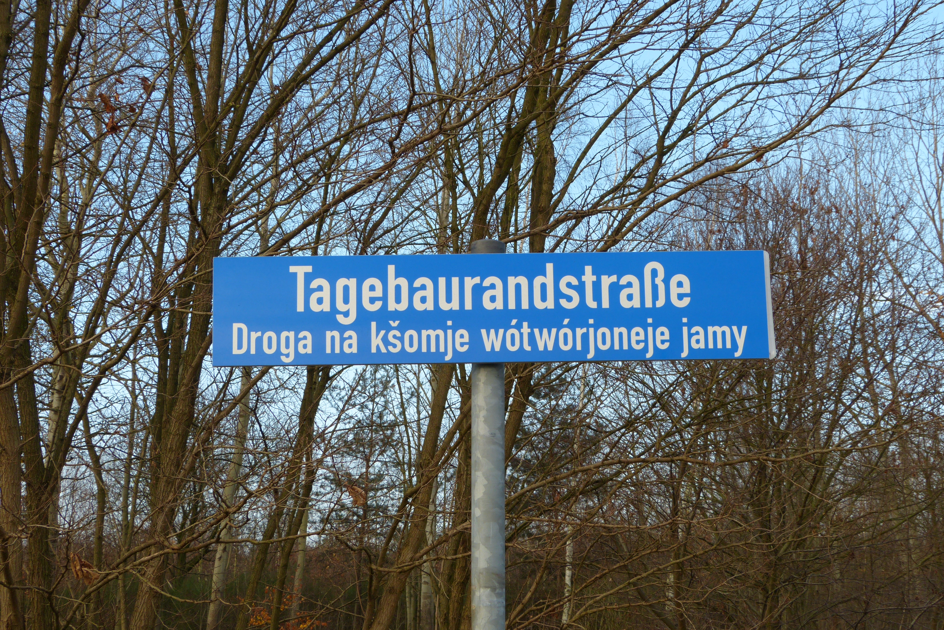 Straßenschild in Spremberg mit deutschen und sorbischen Bezeichnung